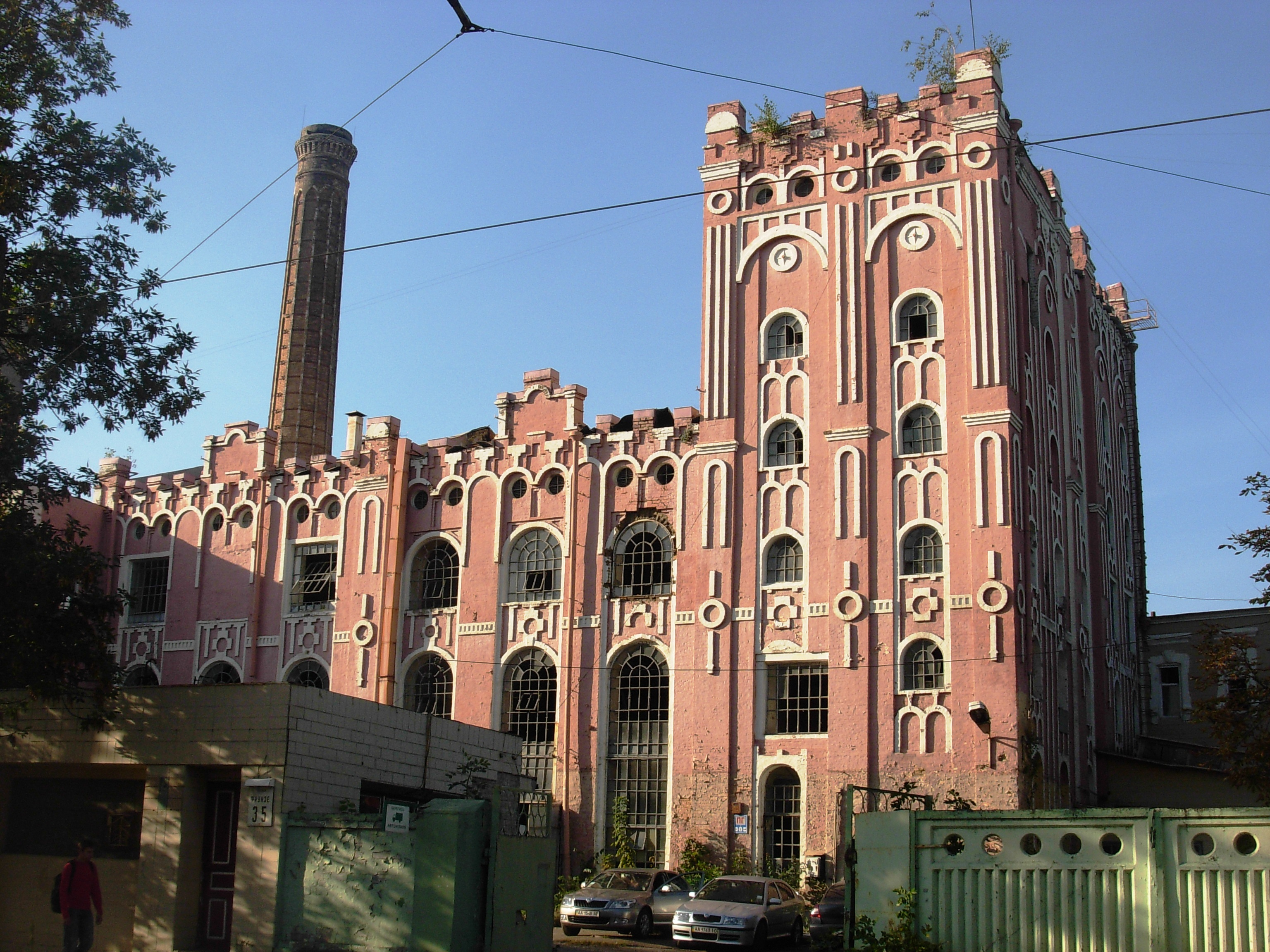 м.Київ, Кирилівська вул.,35, 1895 р. охоронний №201